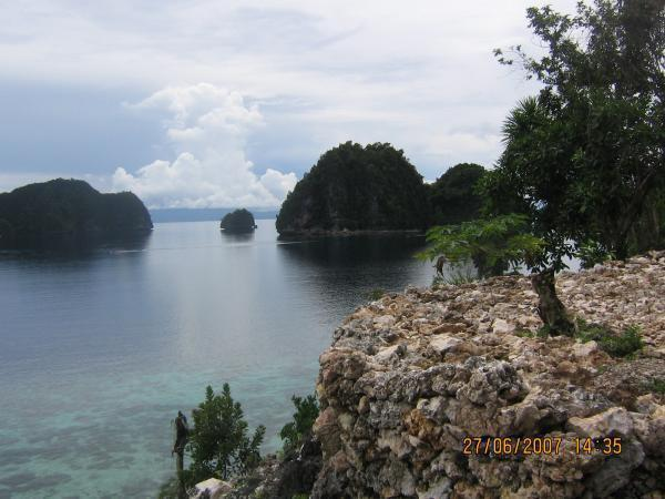 Magsaysay